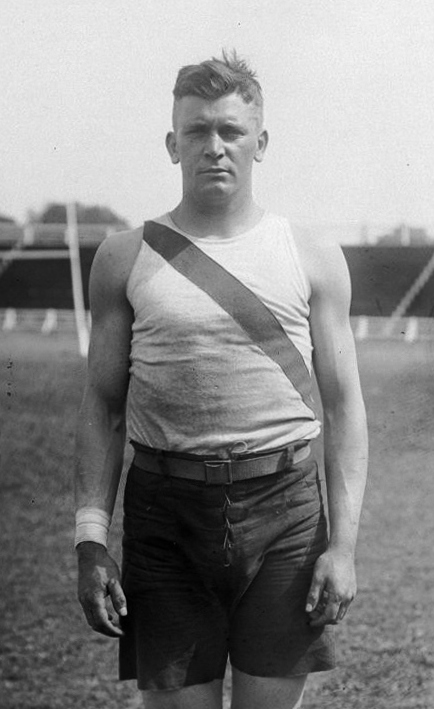 Liversedge [Harry], lancement du poids (américain) [championnats américains, sélection pour les jeux interalliés, 30 mai 1919, stade de Colombes] : [photographie de presse] / [Agence Rol]